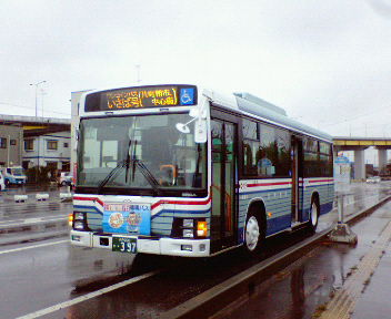 八戸市営バス一般路線塗色（いすゞ・エルガ：PJ-LV321L1）：ワンコインバス・いさば号運用 「舘鼻漁港前」停留所にて